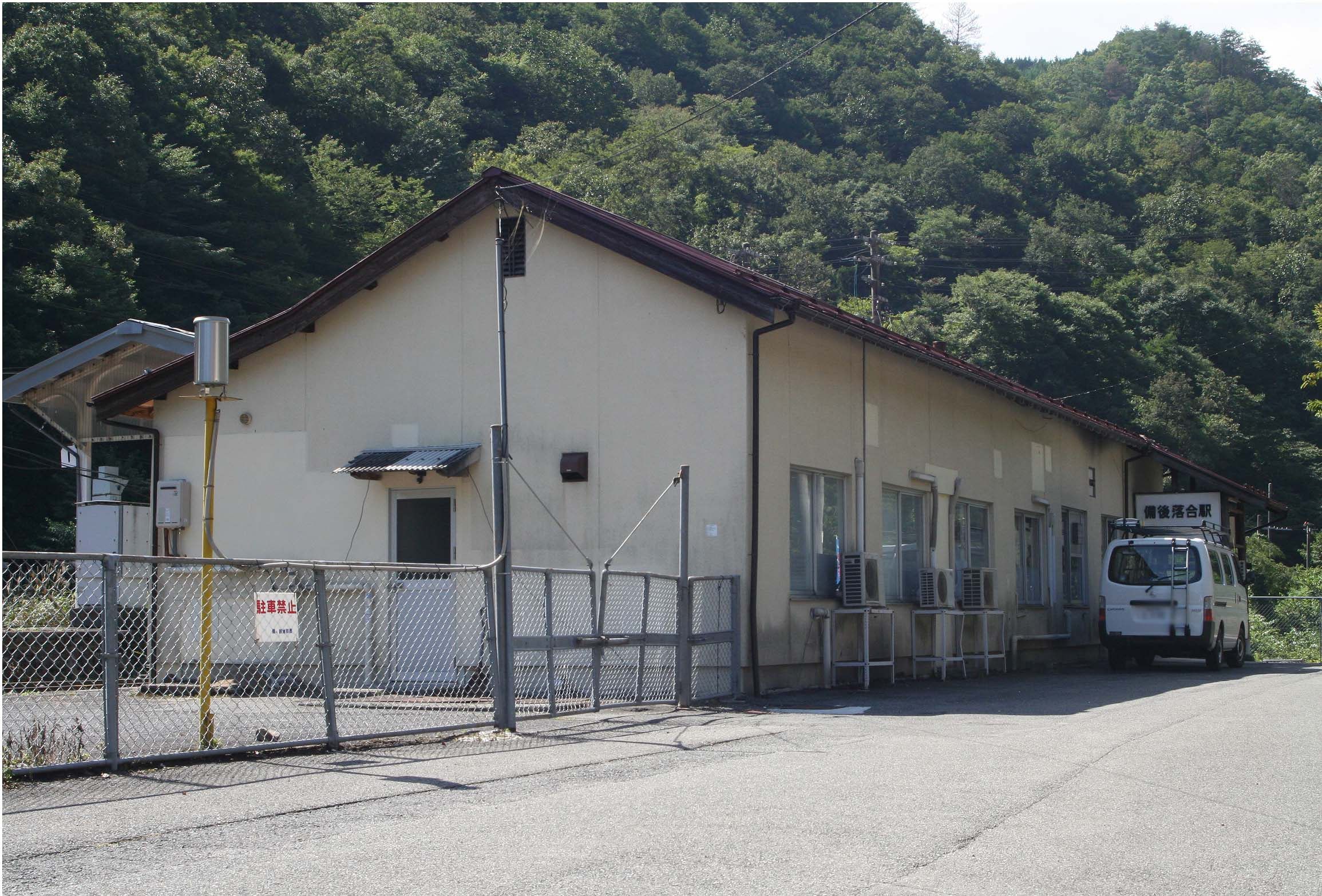 西日本旅客鉄道 備後落合駅の駅舎